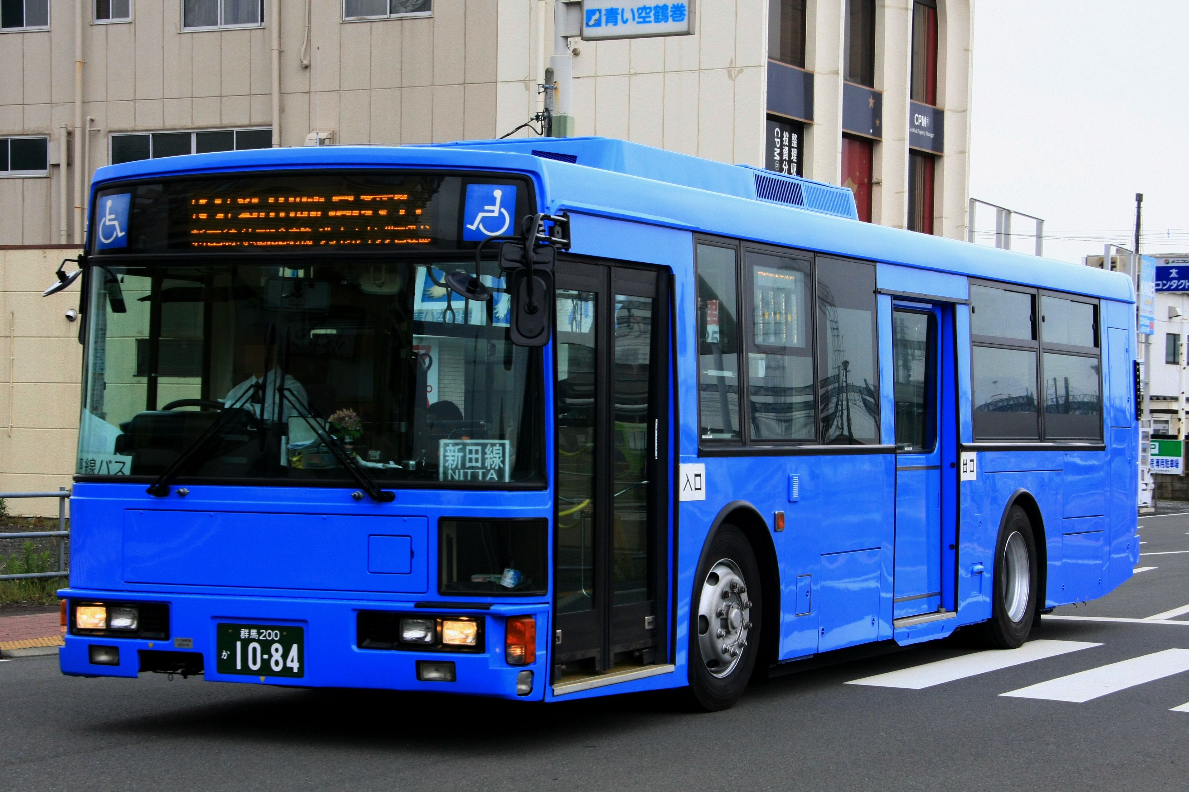 株式会社矢島タクシーが太田駅北口を起点に運行しているコミュニティバス「シティーライナーおおた」。またそれに使用される日産ディーゼル・UA。